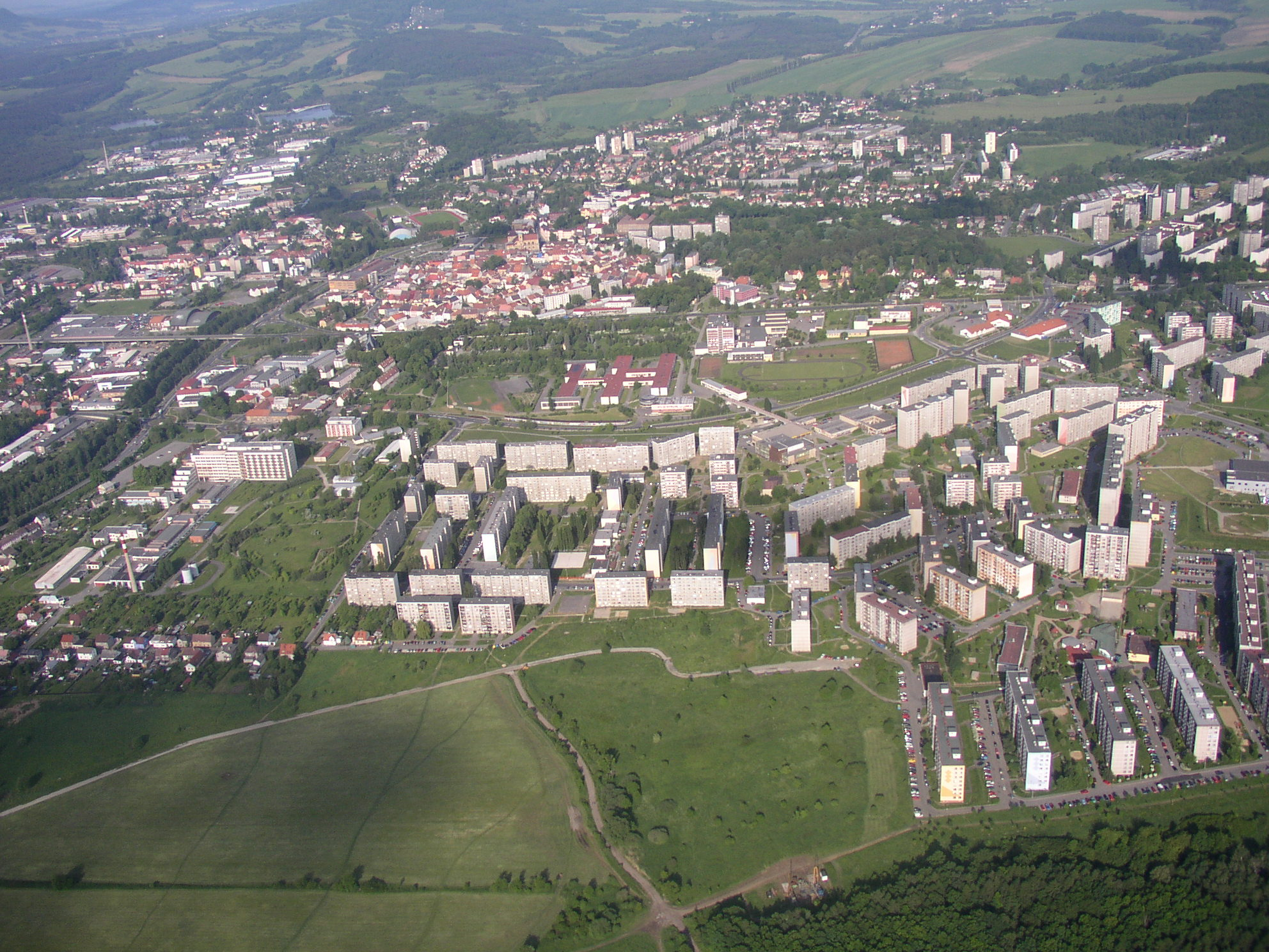 Luftbild von der Stadt Česká Lípa